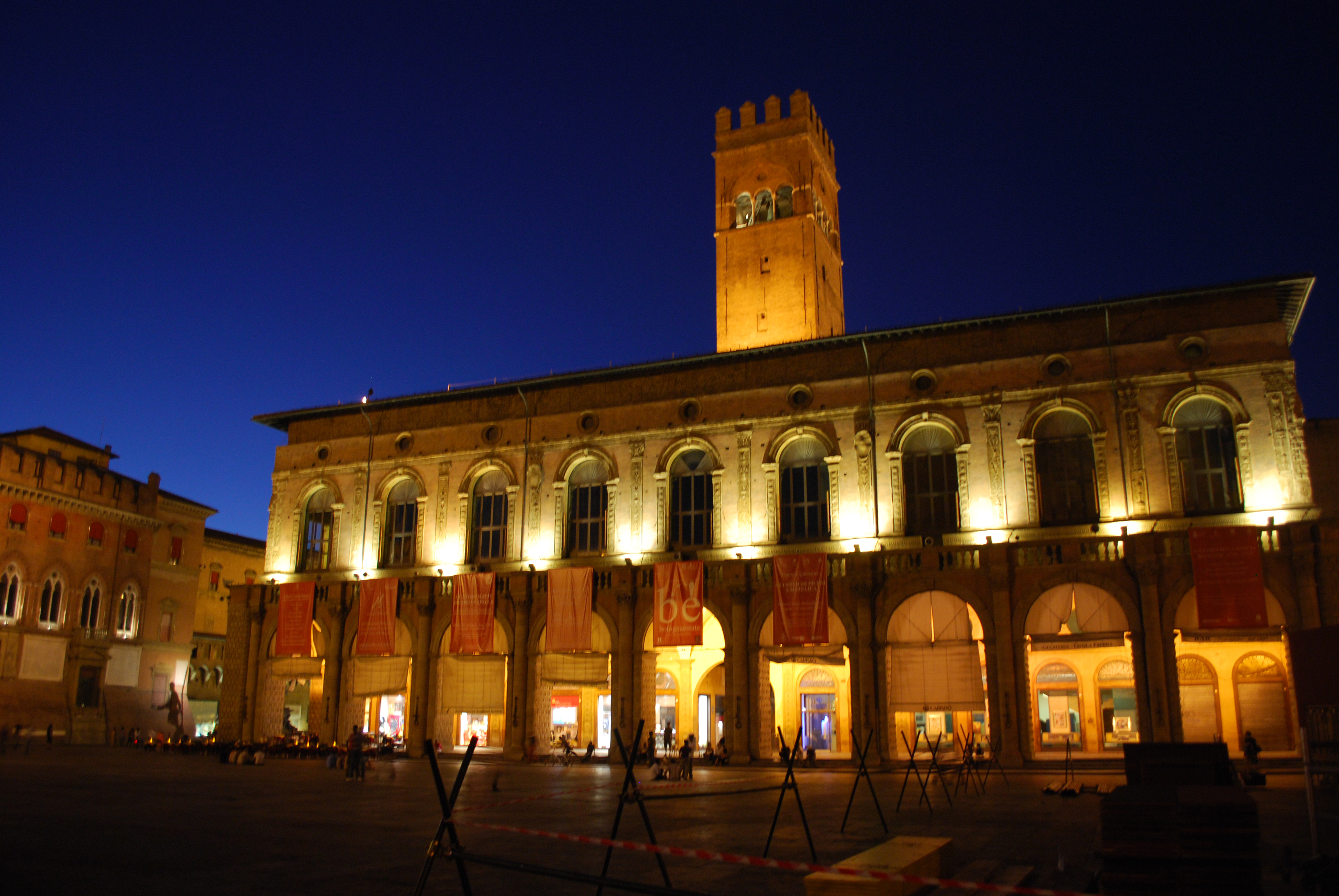 Vue du palazzo del Podesta, à Bologne.